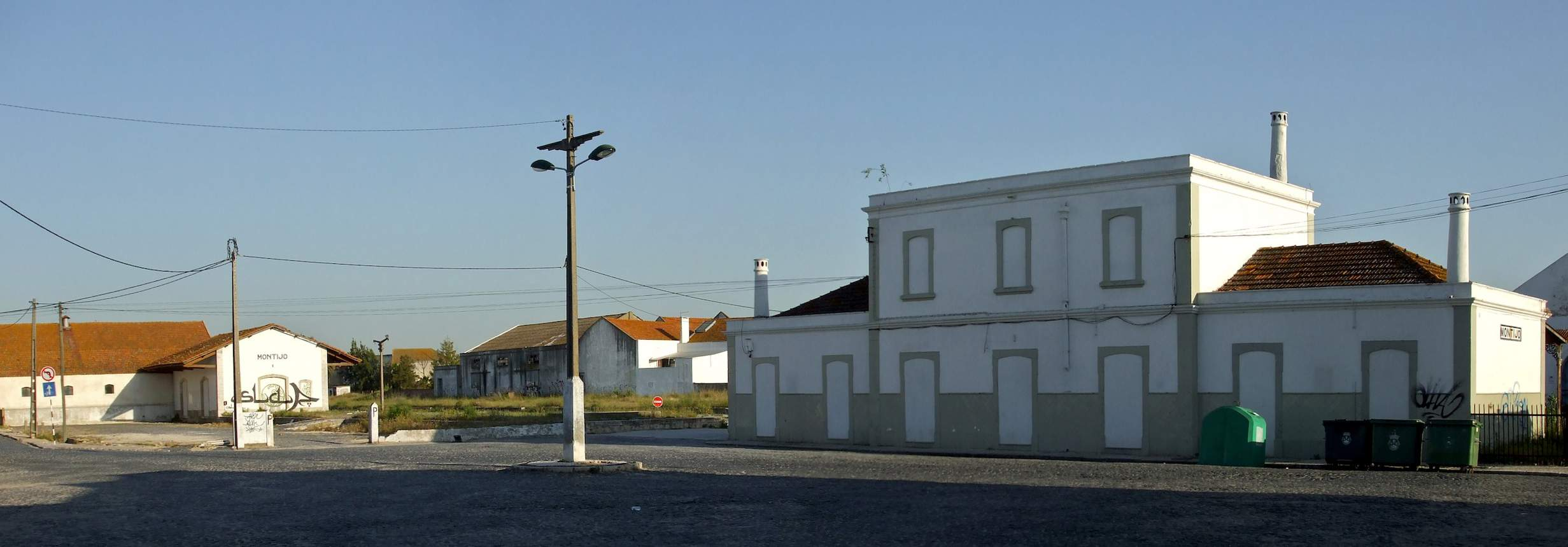 Tipo: Estação (EP) Local: Montijo Ramal do Montijo, PK 26] Data e hora: 5 de Maio de 2009 [19h01]